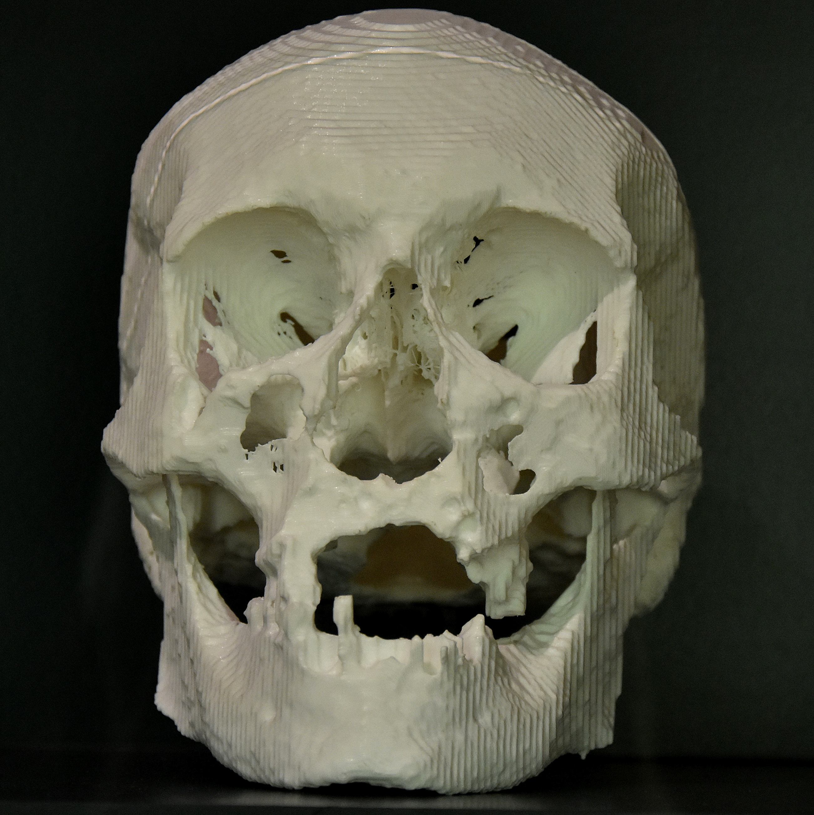 3D-print schedel Lamoraal van Egmont Stadhuis van Zottegem 1-09-2018 This photo of movable heritage has been taken in the Flemish Region